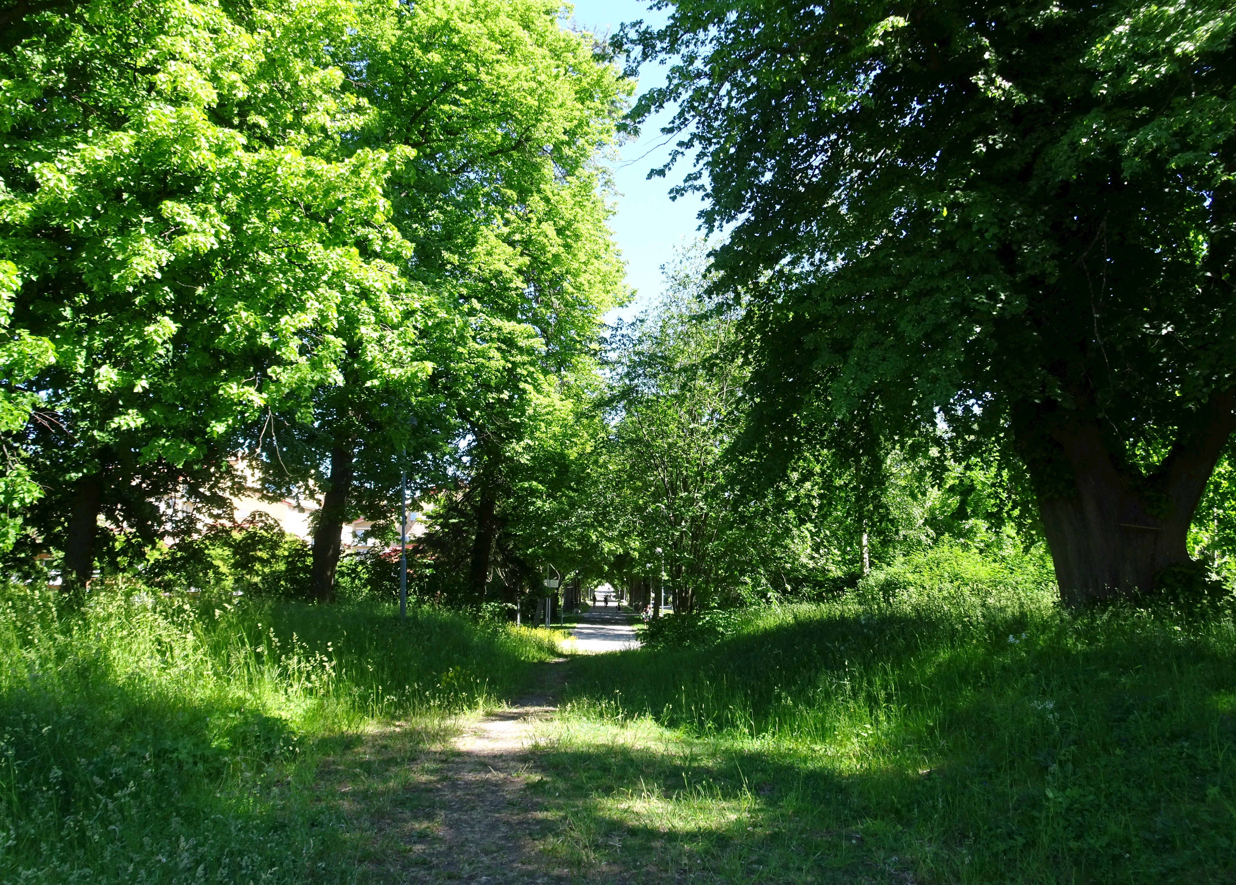 Bergshamra allé österut, gick en gång i tiden fran till Bergshamra gård